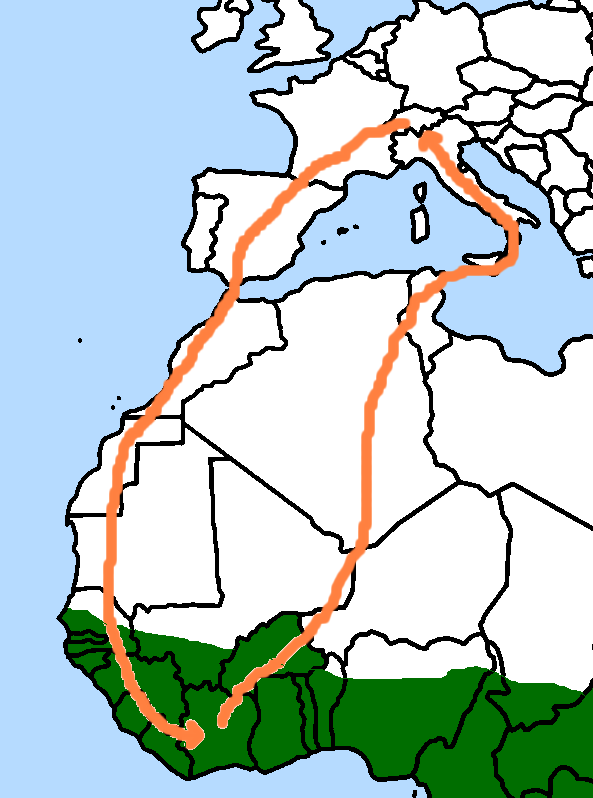 Author is Ulrich Prokop (Scops) Drawn after Ortlieb:Der Schwarzmilan. Westarp Wissenschaften Hohenwarsleben p. 134